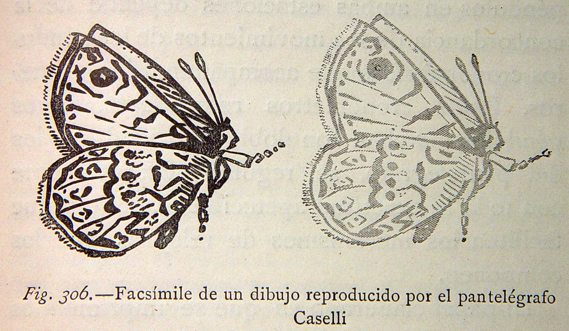 . Ilustraciones de la obra : El mundo físico : gravedad, gravitación, luz, calor, electricidad, magnetismo, etc. / A. Guillemin. - Barcelona Montaner y Simón, 1882